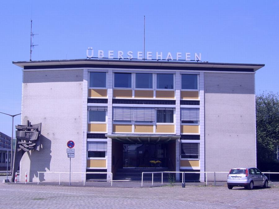 Zollamt Hansator, Häfen, Bremen